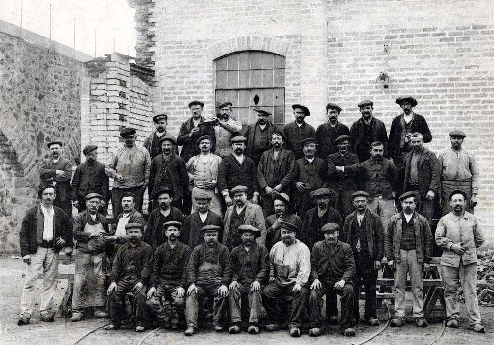 Ouvriers des aciéries du Saut du Tarn.